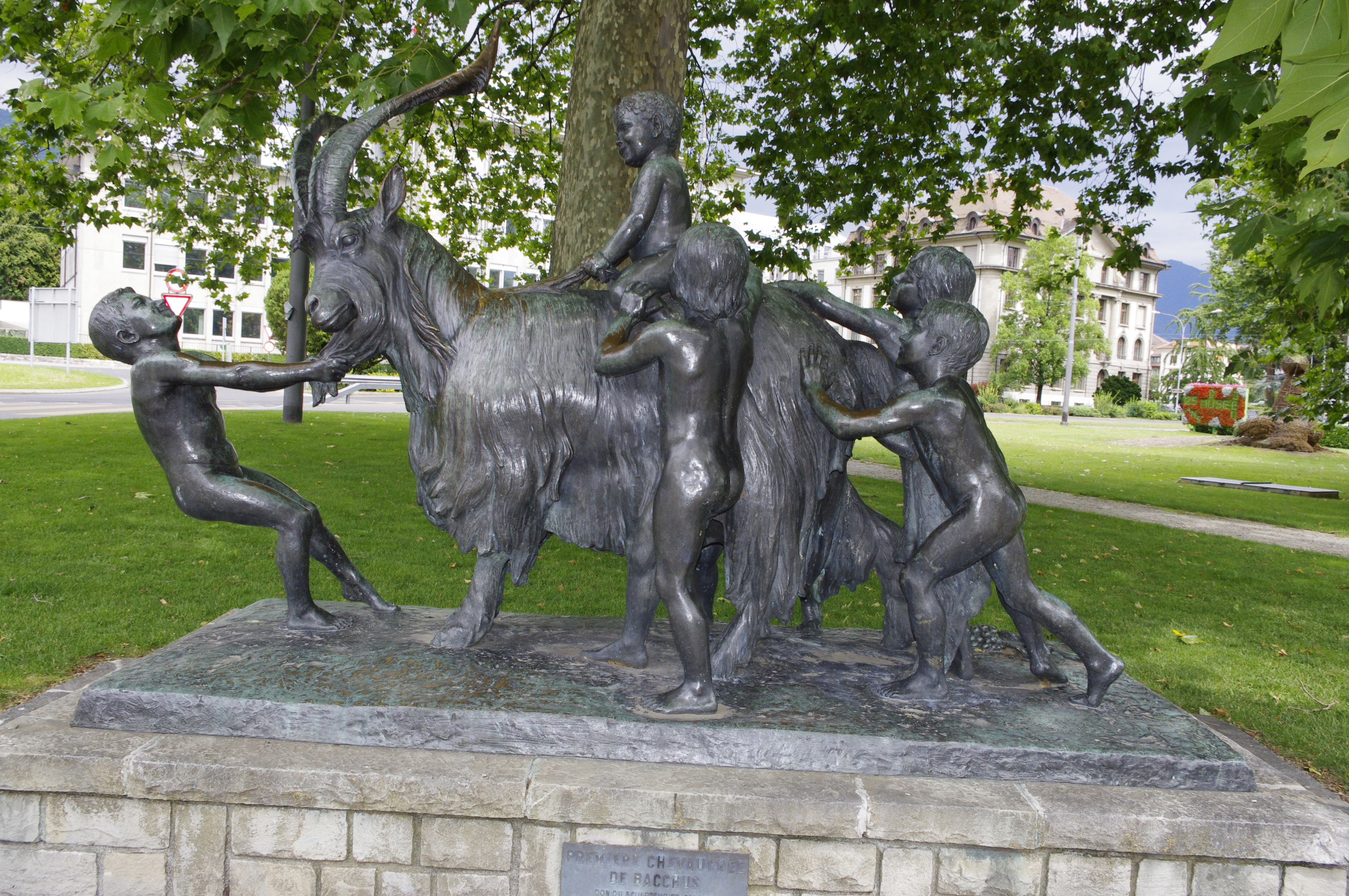 Édouard-Marcel Sandoz : La première chevauchée de Bacchus, 1960, Vevey Entre deux Villes, Suisse